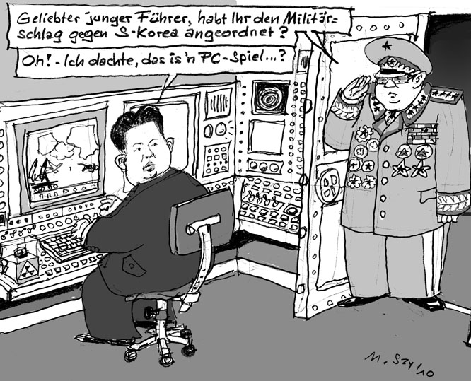 Karikatur, Tiroler Tageszeitung, "Kim Jong, Jr."